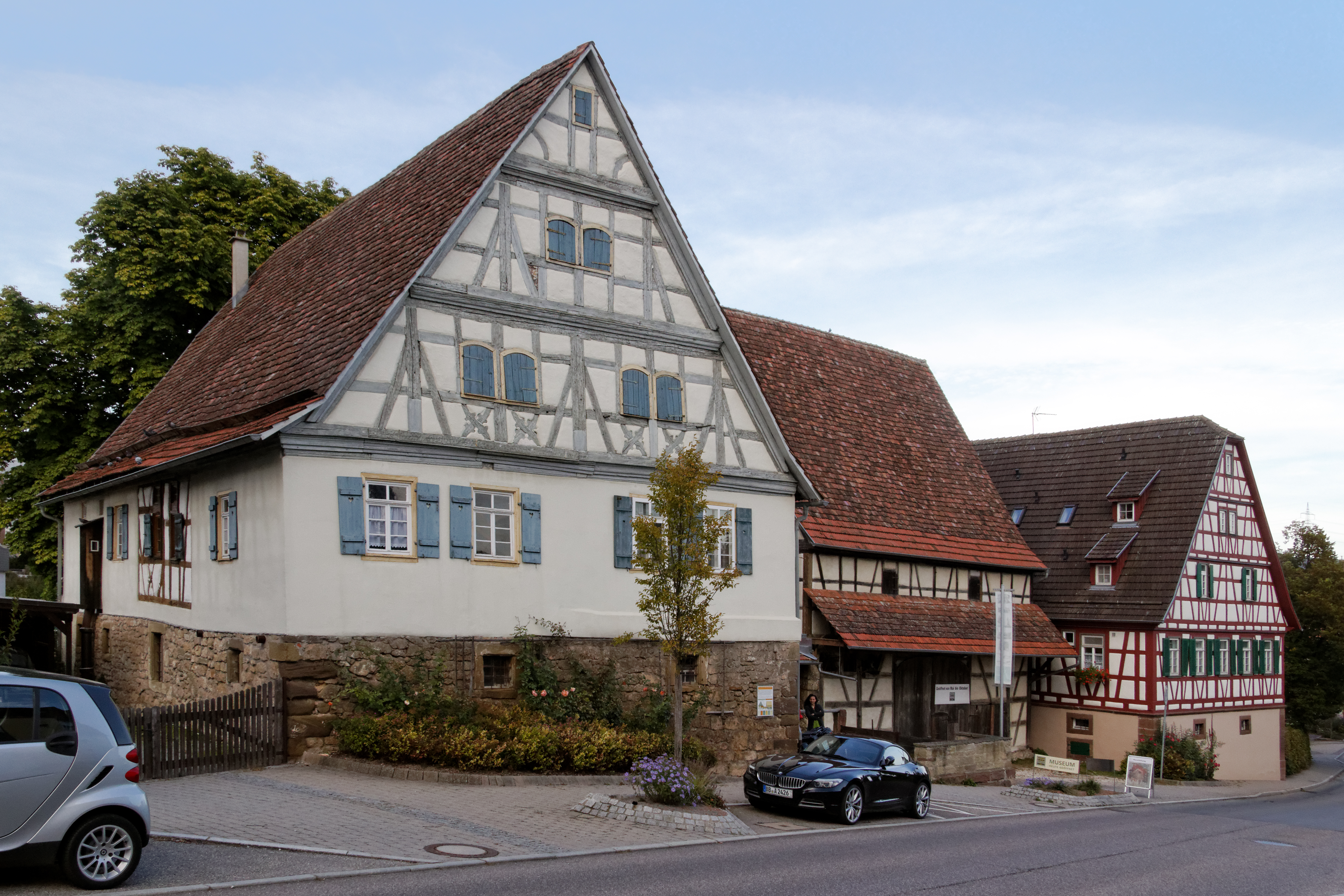 Bauernhausmuseum in Gebersheim, Stadtteil von Leonberg (Baden-Württemberg).